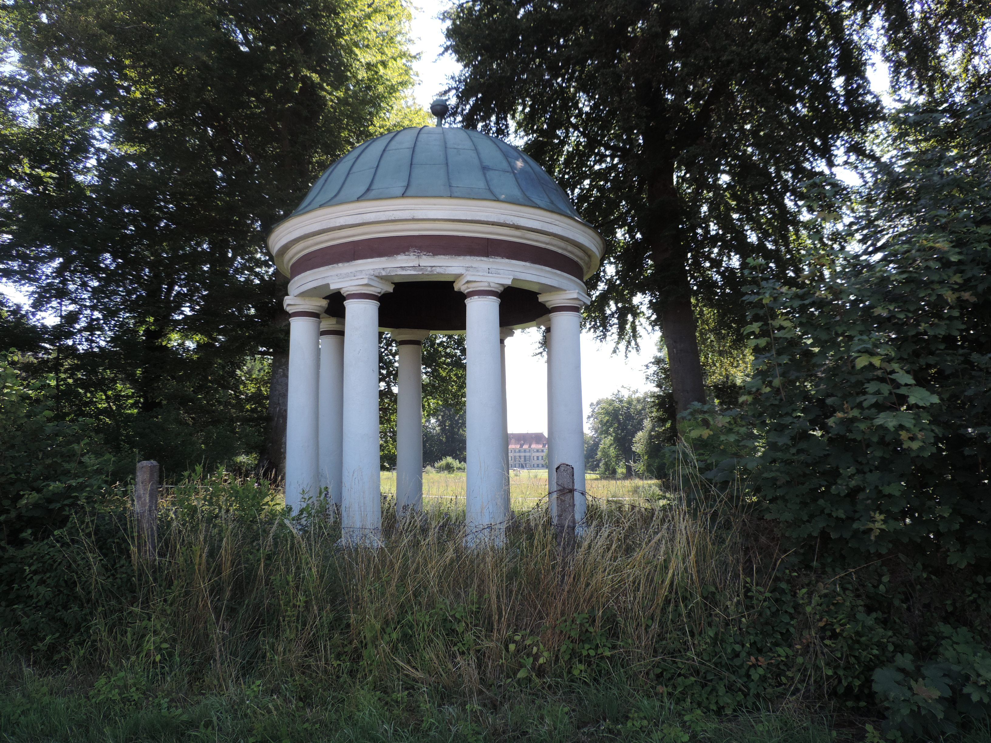 Schloss Amerdingen